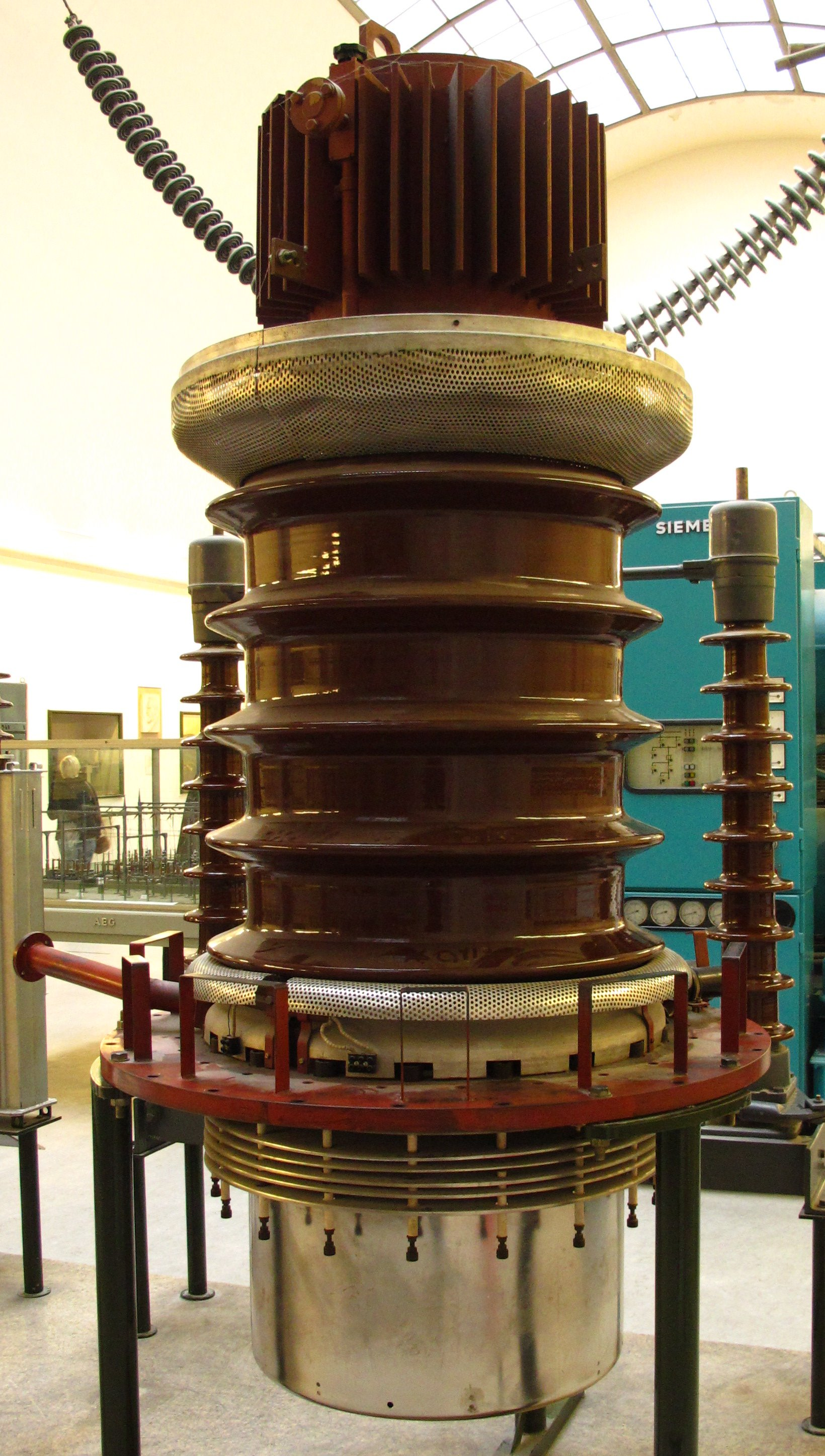 Prototyp eines Anoden-Gitter-System eines Quecksilberdampf-Stromrichters für die Hochspannungs-Gleichstrom-Übertragung (HGÜ, HVDC). Wegen Fortschritte auf dem Gebiet der halbleiterbasierenden Thyristoren für die HGÜ-Technik kam dieses System nie zum Einsatz, allerdings wurden Quecksilberdampfstromrichter ähnlicher Bauart für die HGÜ Wolgograd-Donbass verwendet Hersteller: BBC, 1965, im Rahmen der Forschungsgemeinschaft für Hochspannungs- und Hochstromtechnik e.V., Mannheim-Rheinau. Anoden-Scheitstrom: 1000 A Sperrspannungs-Scheitelwert: 110 kV